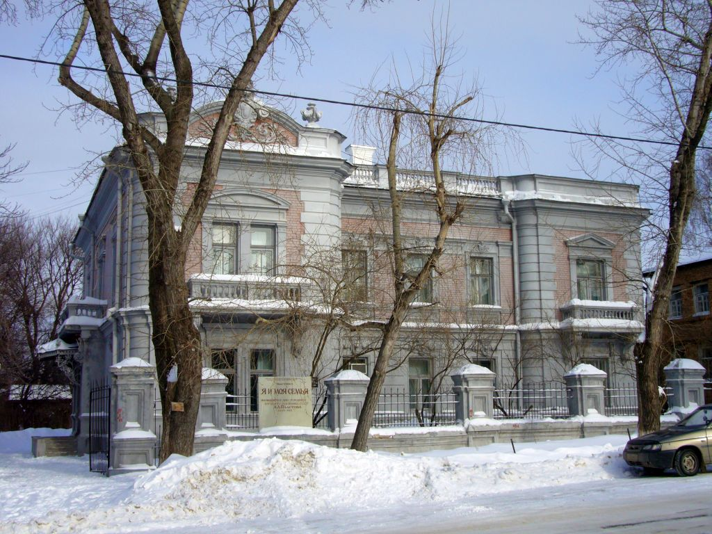 Симбирск. Дом барона Х.Г. Штемпеля. Архитектор А.А. Шодэ. 1905-1906 гг.